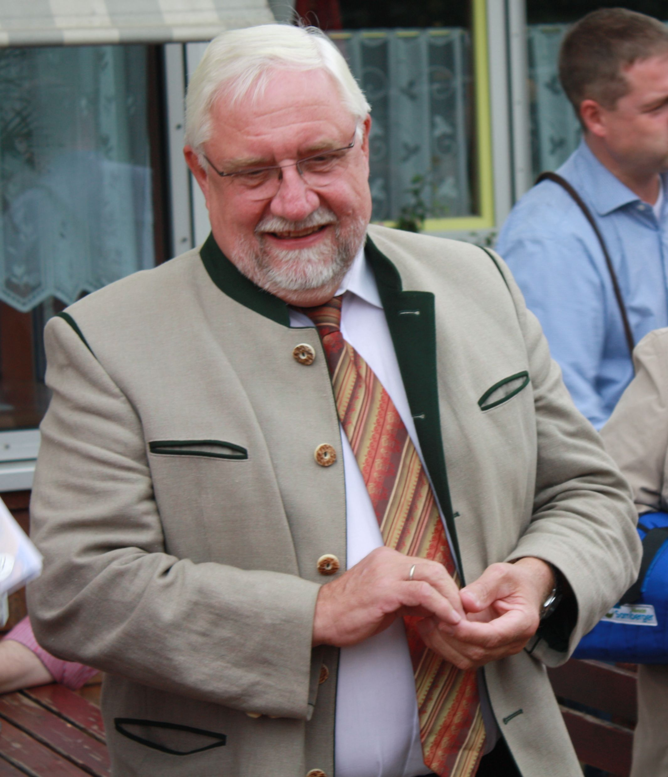 Dr. Max Lehmer, CSU, Bundestagsabgeordneter für Erding-Ebersberg